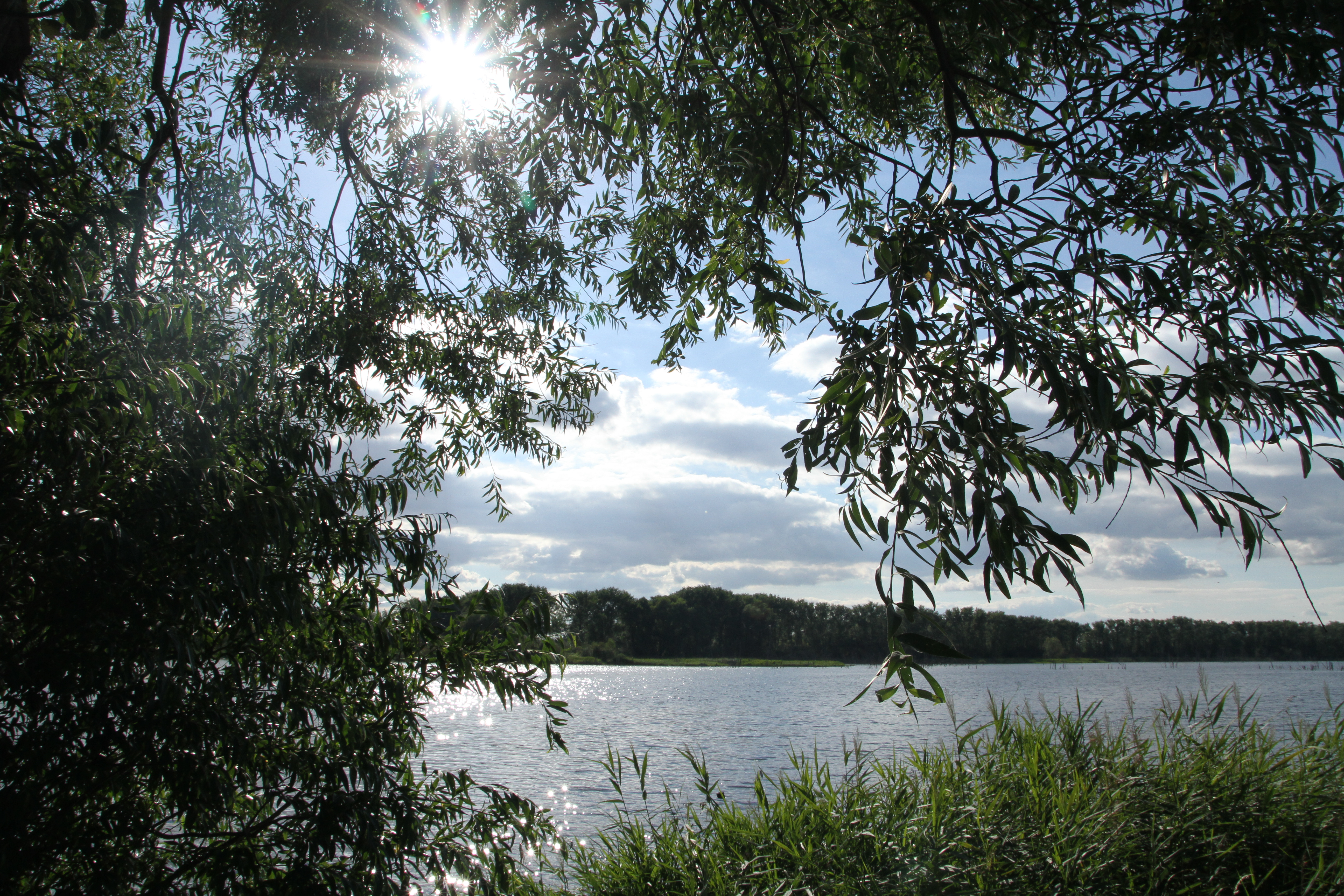 Blick über den Aschersleber See (auch Wilsleber oder Wilslebener See genannt) in Aschersleben, Sachsen-Anhalt; der See und seine Umgebung liegen im Naturschutzgebiet „Wilslebener See“